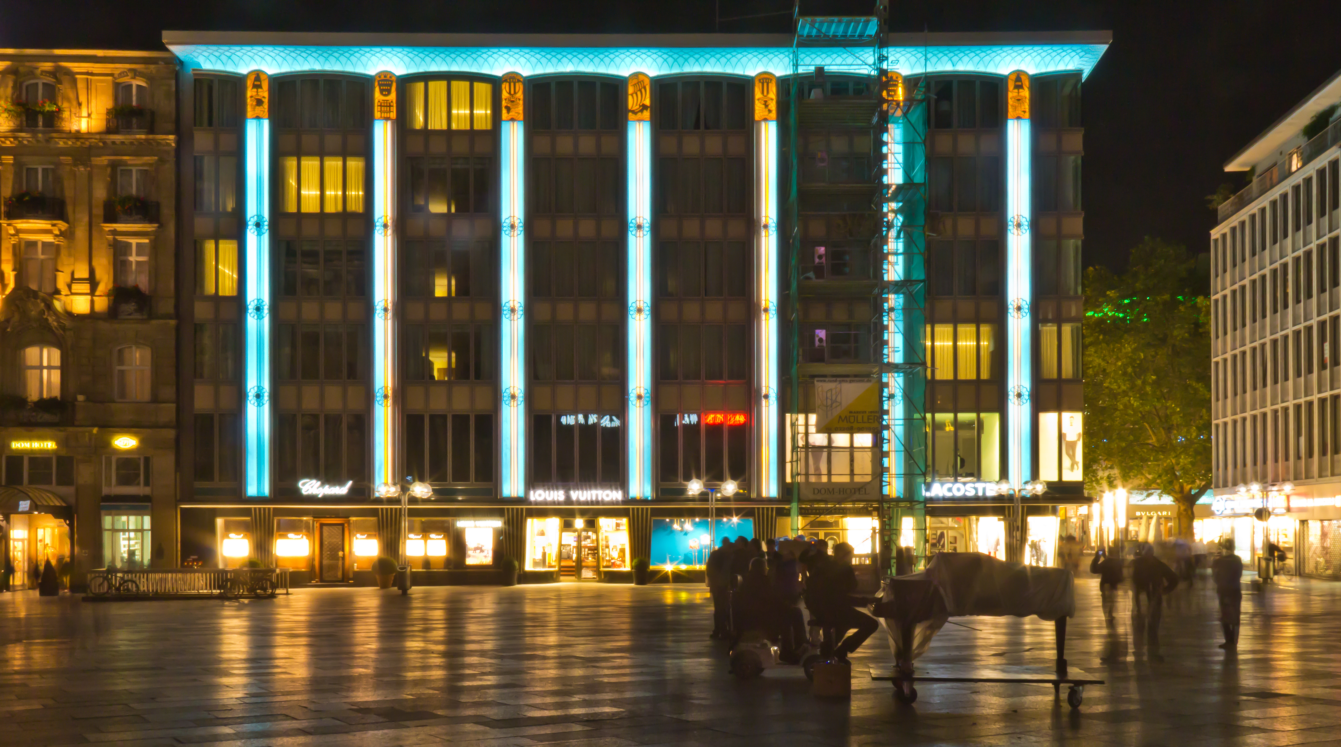 Denkmalgeschütztes Büro- u. Geschäftshaus "Blau-Gold-Haus", Köln. Architekten: Wilhelm Koep und Rudolf Koep, Baujahr: 1952, Bauherr: 4711 Muelhens KG